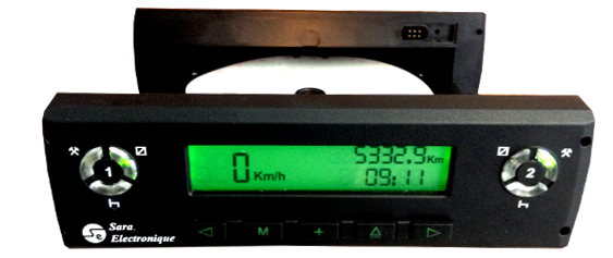 chronotachygraphe SE2306 conçue et fabriqué par Sara electronique